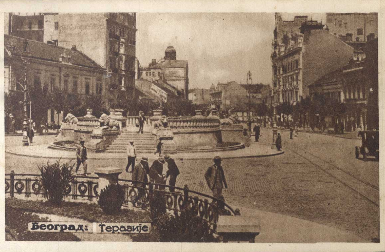 Terazije in Beograd, 1925